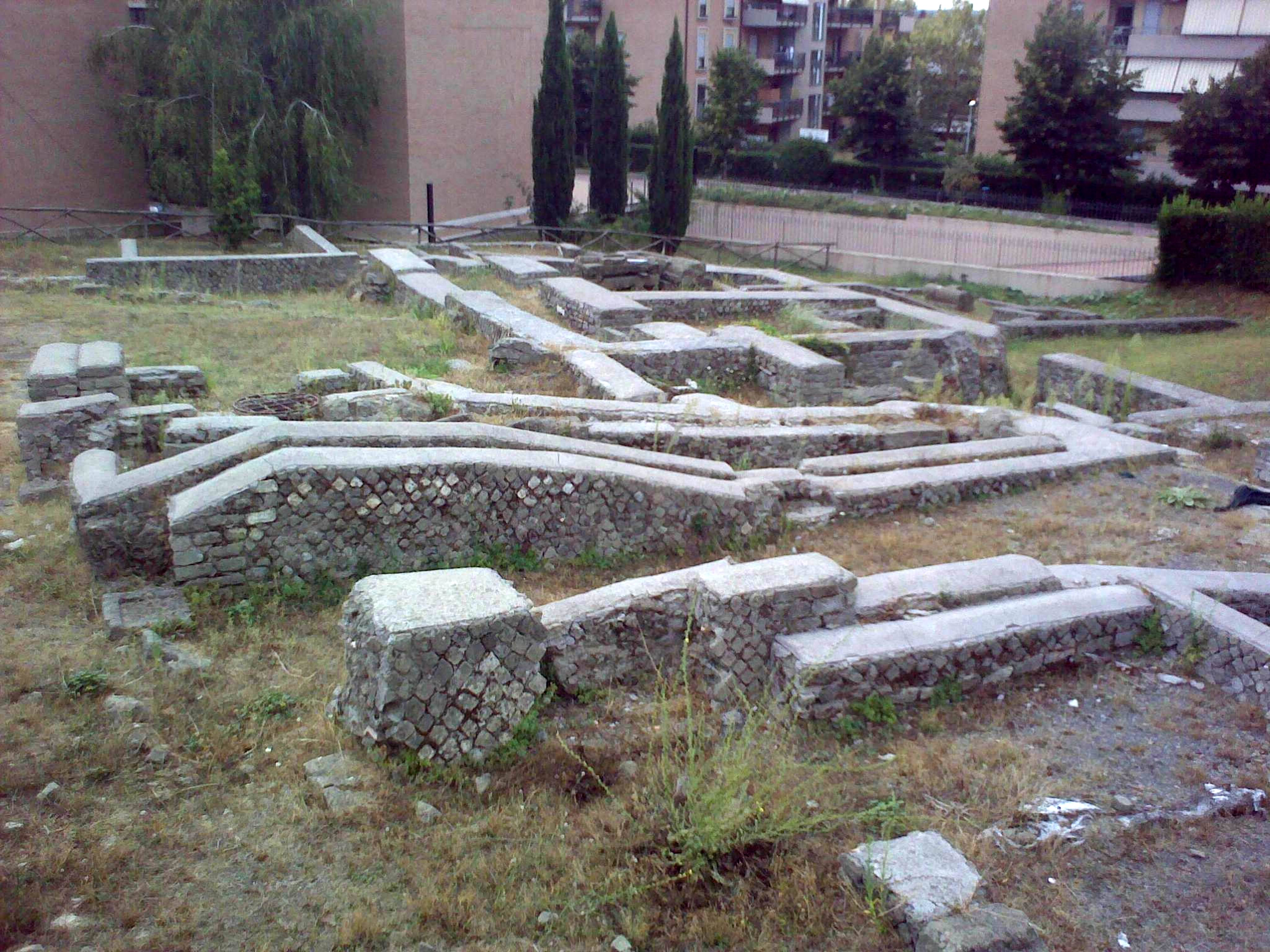 Albano Laziale, resti archeologici romani presso l'edificio dell'Agenzia delle entrate